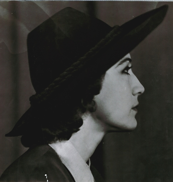 Eva Sletto, portrett, kvinne, skuespillerinne, brystbilde, profil, hatt.